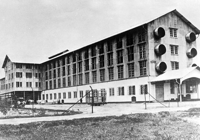 Repronegatief. Theefabriek van de H.V.A., Balimbang